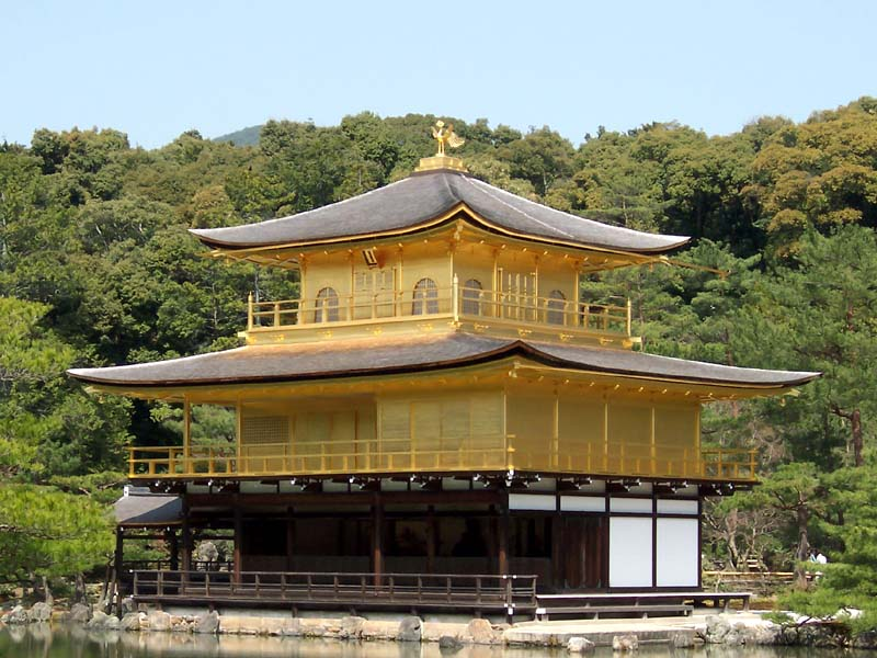 Kinkakuji (Jp. 金閣寺, Golden Pavilion Temple)Kinkakuji - postcard view